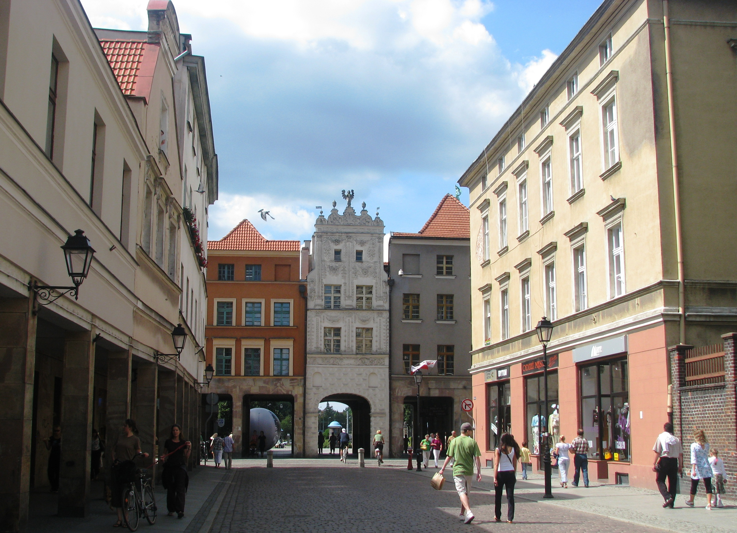 dzielnica staromiejska, 1233, 1264